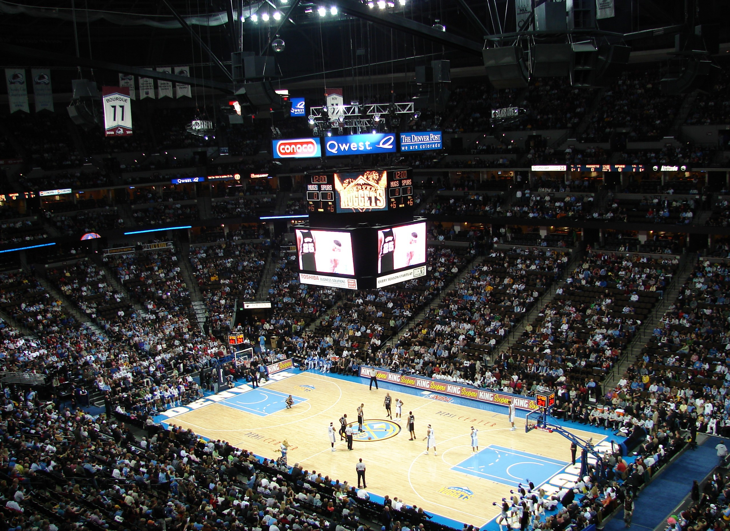 Innenansicht des Pepsi Center in Denver, Colorado; Aufgenommen während einem Basketballspiel der Denver Nuggets gegen die San Antonio Spurs